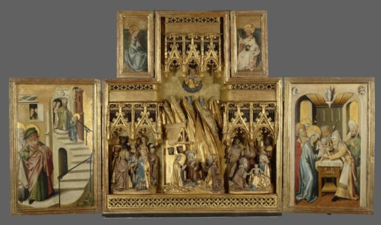 Das kleinformatige Retabel, das um 1441 in Brüssel oder Löwen gefertigt wurde, gehört zu den ältesten und besterhaltenen Flügelaltären des Landesmuseums Württemberg. Es bezaubert durch die prächtige Ausführung der farbig gefassten Skulpturen und Tafelbilder sowie die anschauliche Schilderung der dargestellten Szenen. Erzählt werden Episoden aus dem Leben Mariae bzw. Jesu. Das Zentrum des Schreines bildet eine detailreich ausgearbeitete Geburt Christi.Das Retabel stammt aus der ab 1436 errichteten Marienkirche in Rieden bei Schwäbisch Hall. Es kam als Importwerk aus Brabant, heute in Belgien gelegen, nach Hohenlohe. Faszinierend empfand man sicherlich die glanzvolle Wirkung sowie den neuartigen Realismus der Darstellungen.[Ingrid-Sibylle Hoffmann]